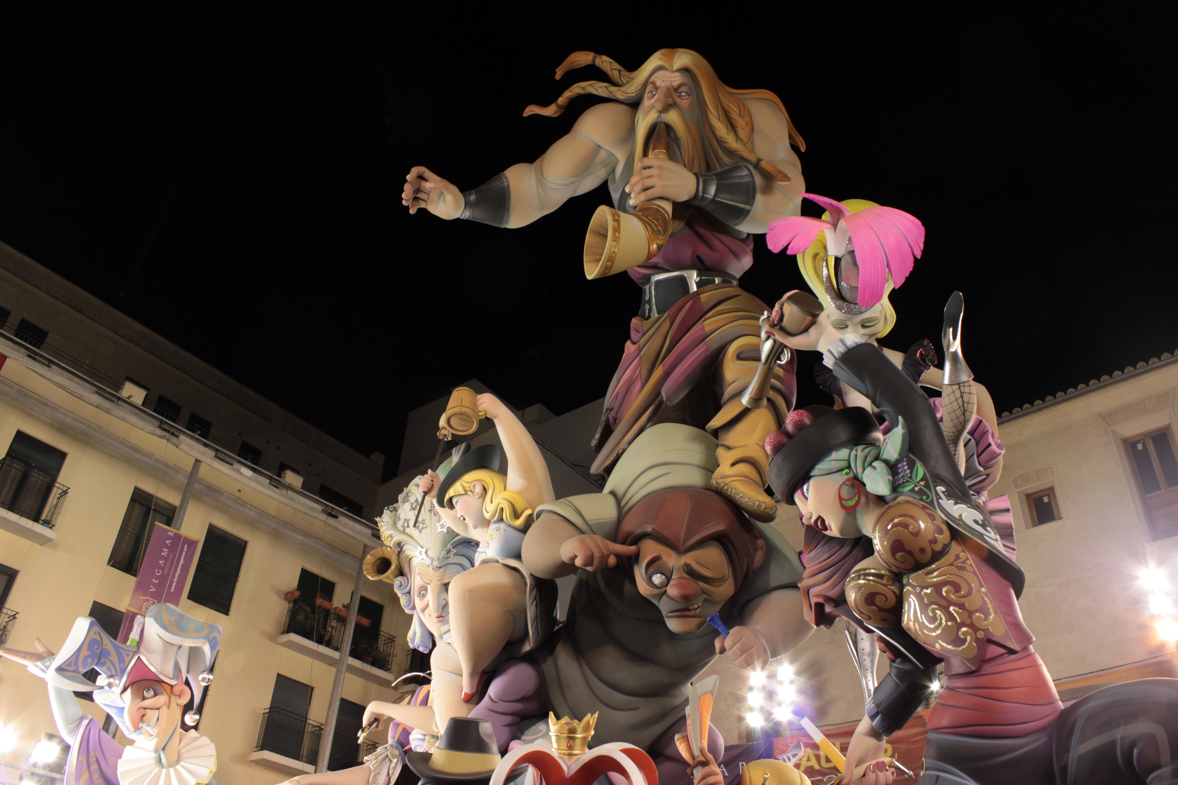 Falla El Pilar 2014, Valencia, Comunidad valenciana, España.